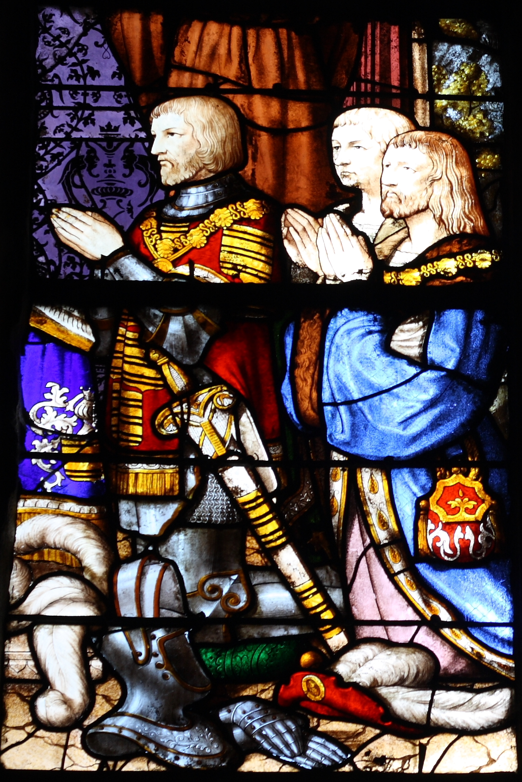 Bleiglasfenster Nr. 8 (16. Jahrhundert) in der katholischen Pfarrkirche Saint-Martin (Collégiale Saint-Martin) in Montmorency, Darstellung: Guillaume Gouffier mit zwei Söhnen (siehe: Dominique Foussard, Charles Huet, Mathieu Lours: Églises du Val-d'Oise. Pays de France, Vallée de Montmorency, Société d'Histoire et d'Archéologie de Gonesse et du Pays de France, 2. Auflage, Gonesse 2011, ISBN 9782953155426)